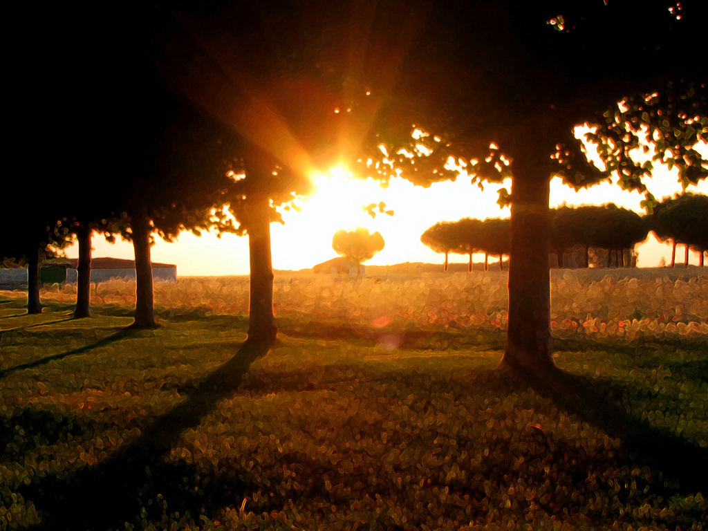 Arroyejo